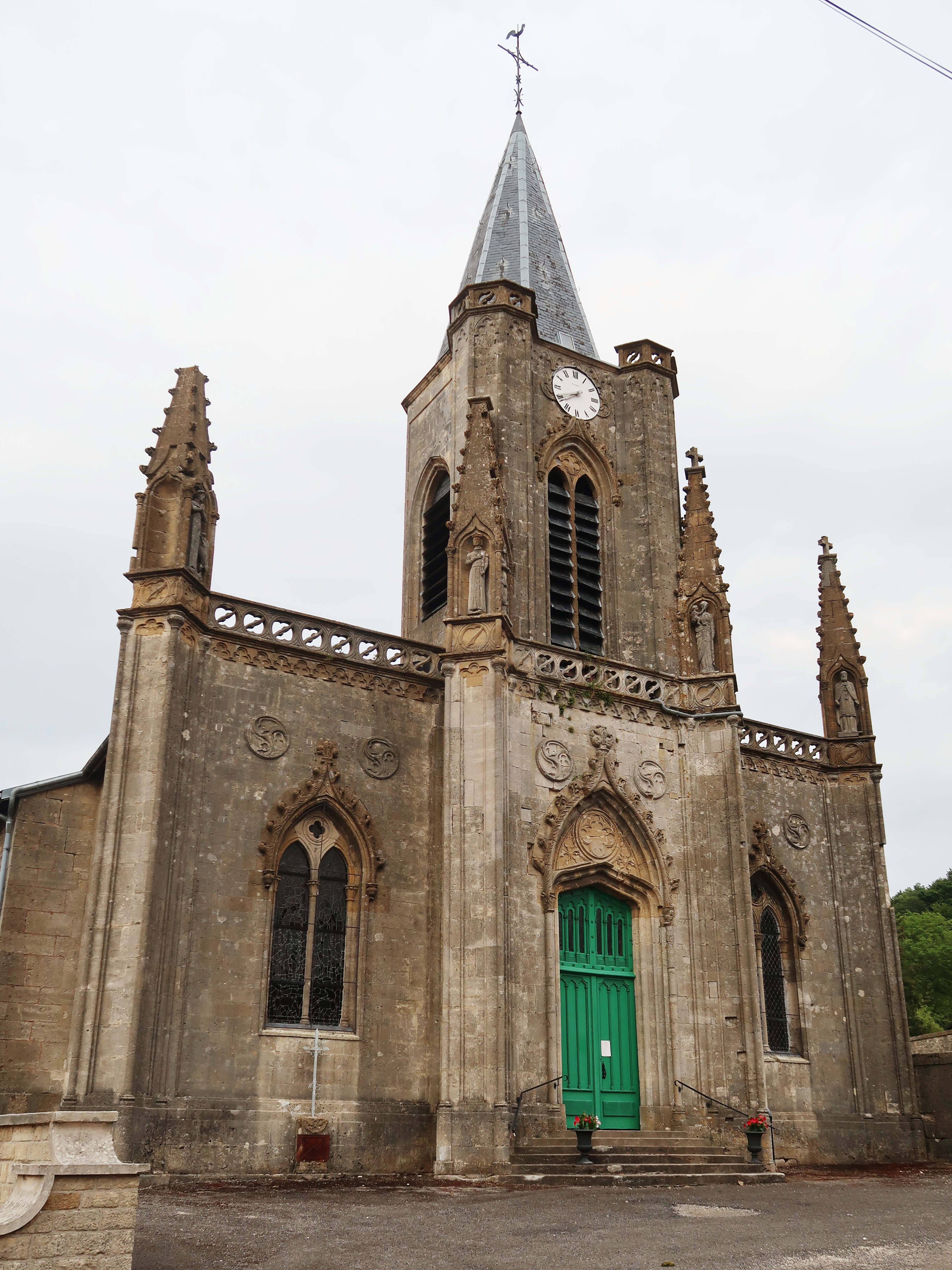 Murvaux, église, façade